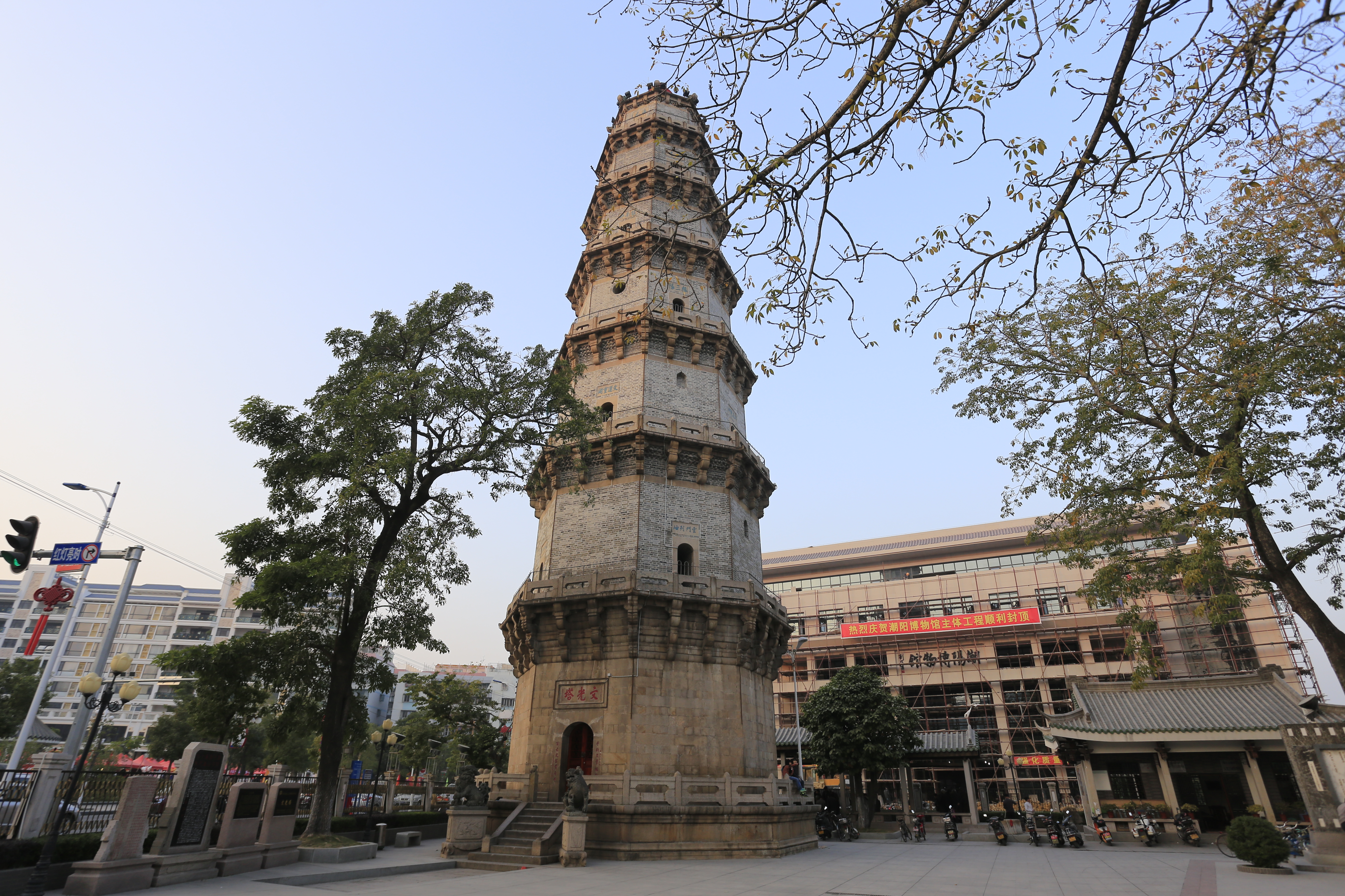 潮阳 文光塔